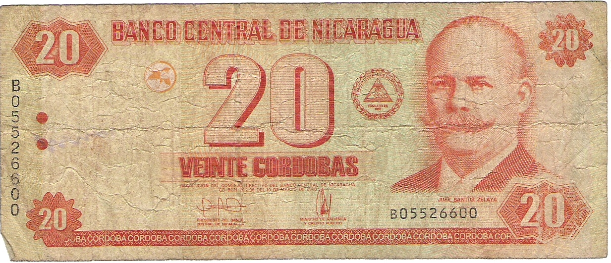 C$20 córdoba showing José Santos Zelaya